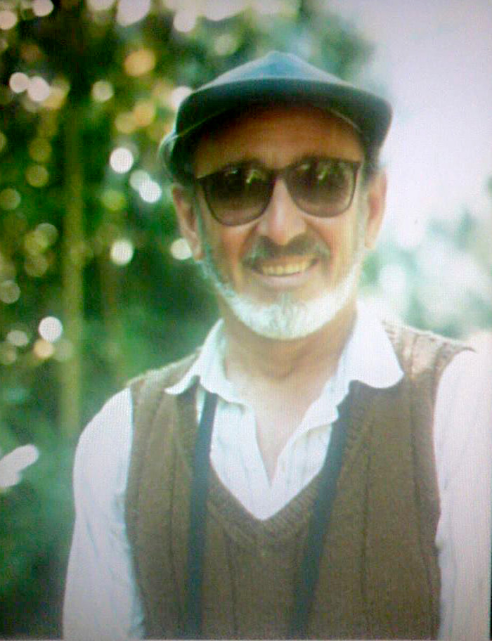 Dario Yzurieta, ornitólogo de campo, ilustrador naturalista, co-autor de la Guía de Identificacion, Aves de Argentina y Uruguay